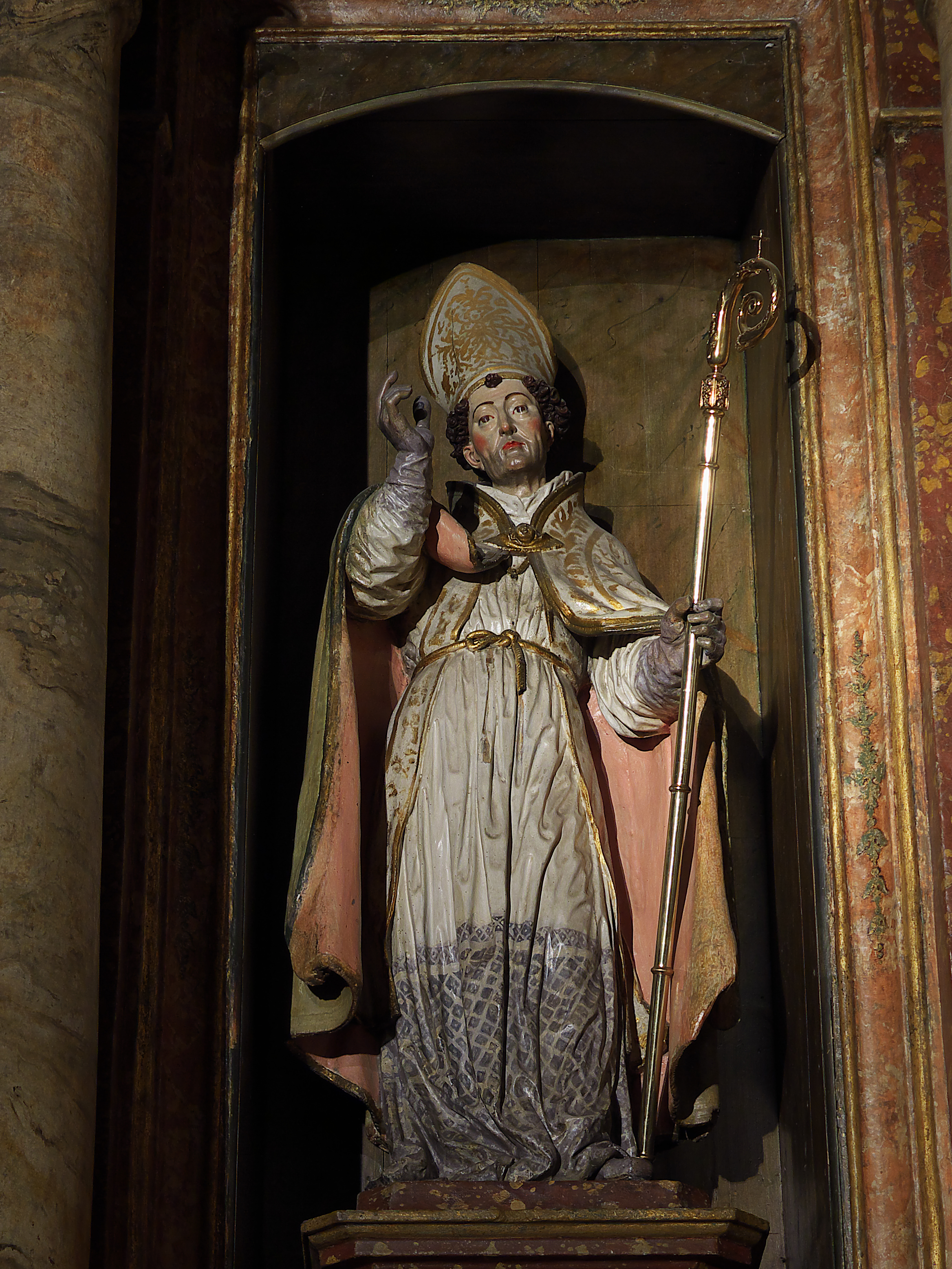 Capilla de San Froilán, Catedral de Santa María de Lugo. Escultura en madera policromada de Francisco de Moure.